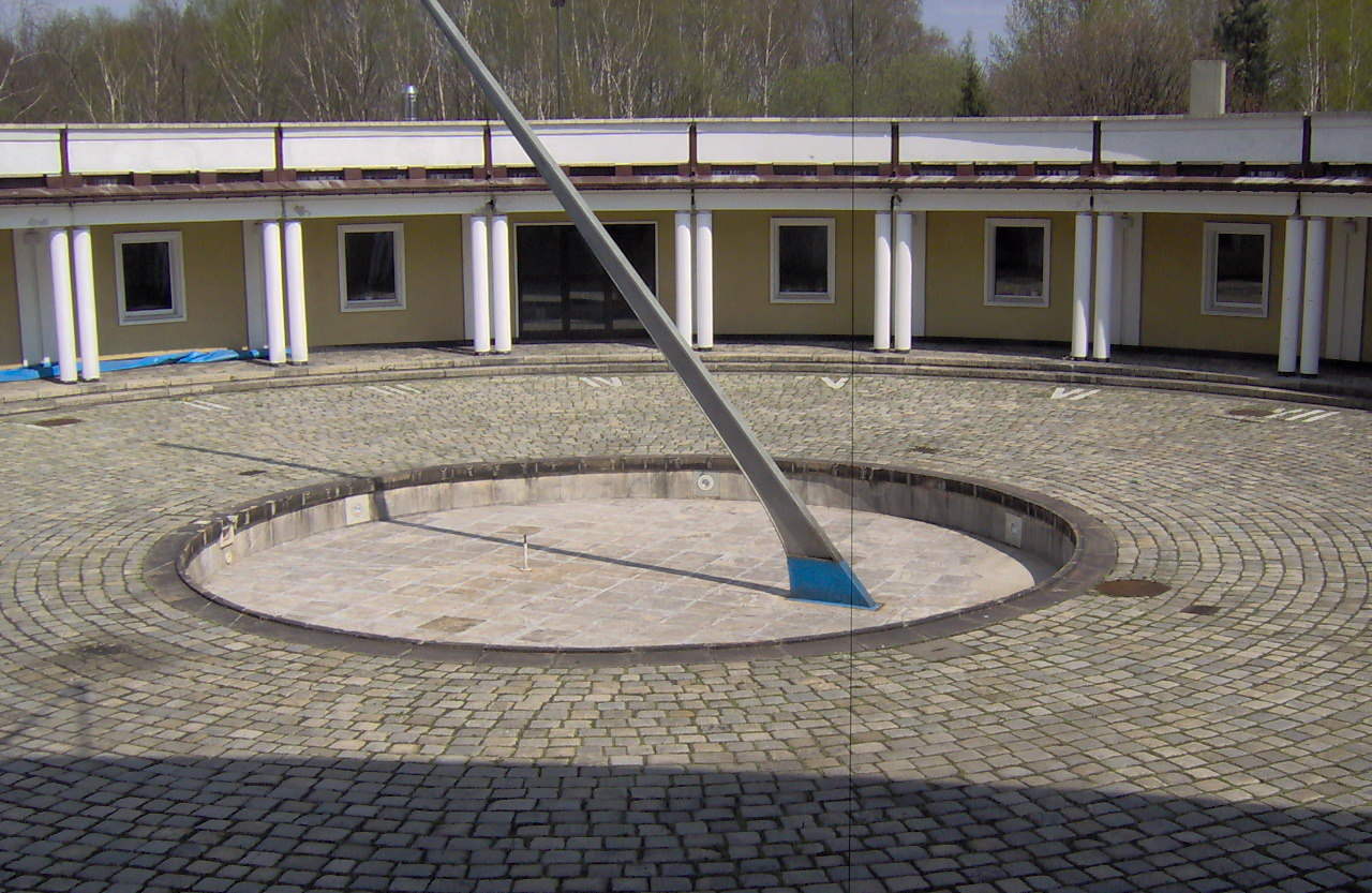 Damian Depowski, foto 2005-04-24, Zegar słoneczny w Planetarium Śląskim, Poland.